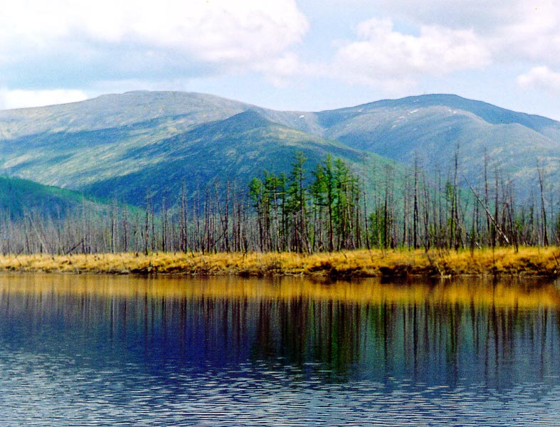 Баунтовская котловина